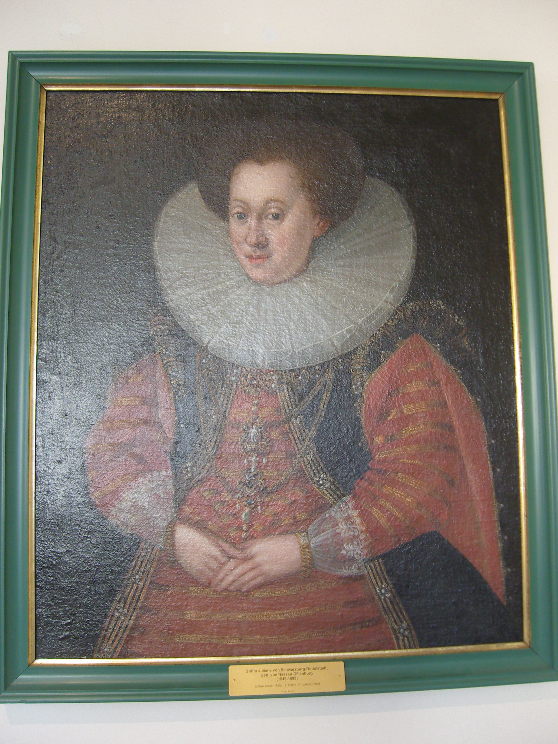 Porträt von Juliane von Schwarzburg-Rudolstadt; geb. Nassau-Dillenburg; ausgestellt in der Heidecksburg; unbekannter Maler